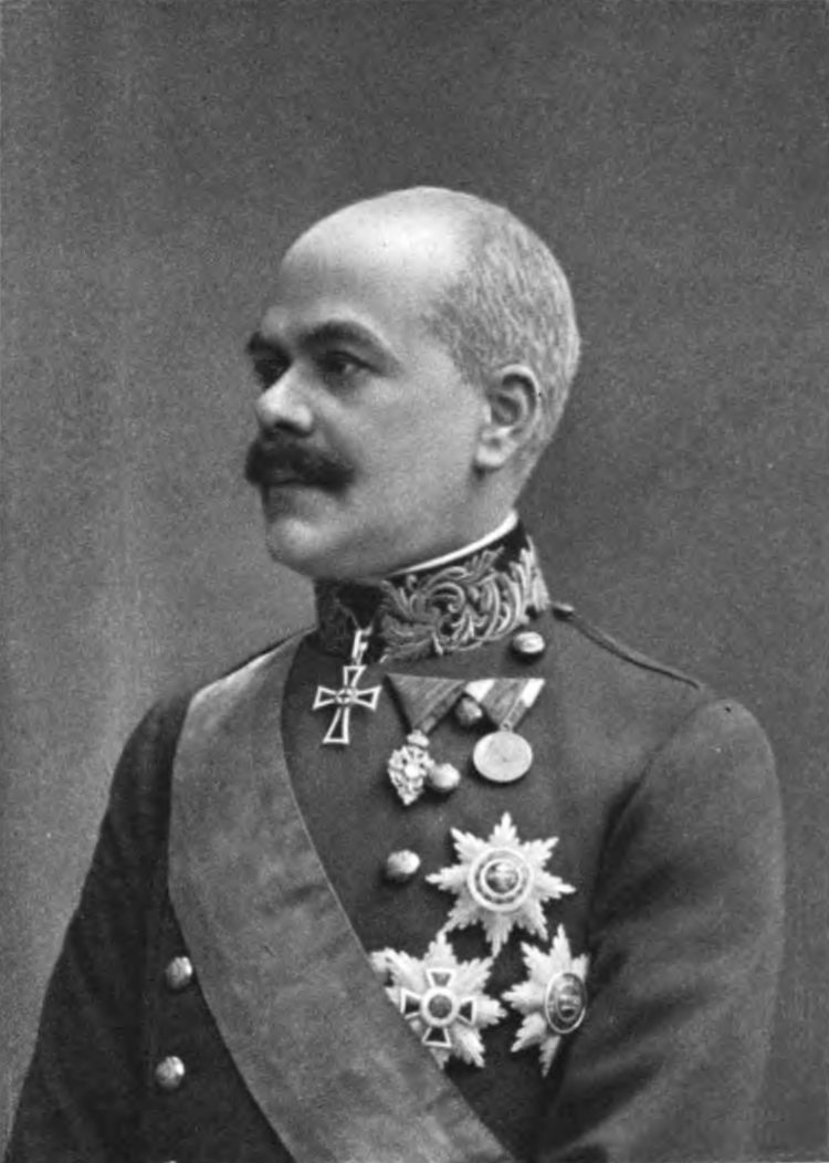 Ernest von Koerber (1850-1919), Austrian-Hungarian politician